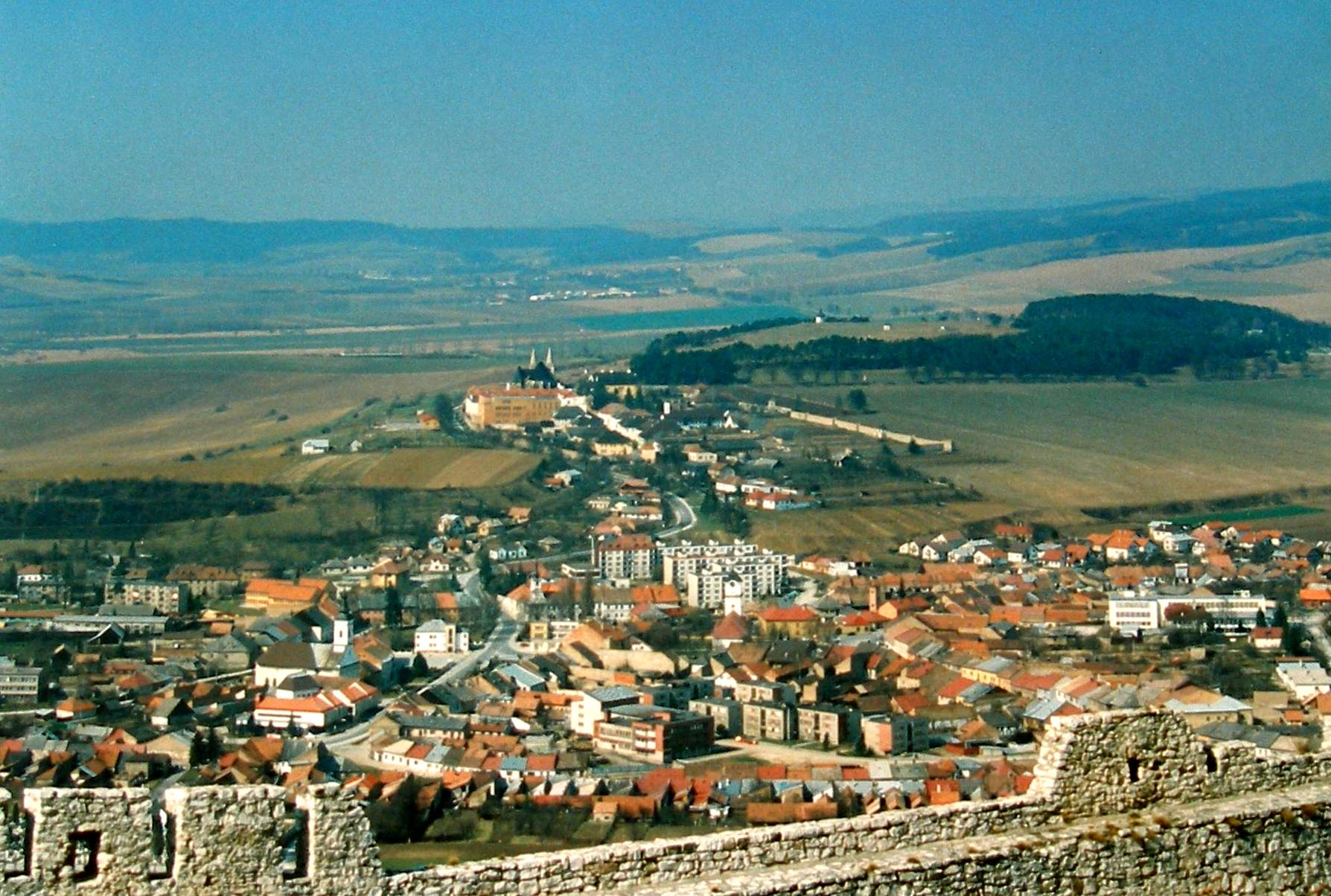 Spišské Podhradie pohľad zo Spišského hradu, región Spiš. V pozadí Spišská Kapitula.